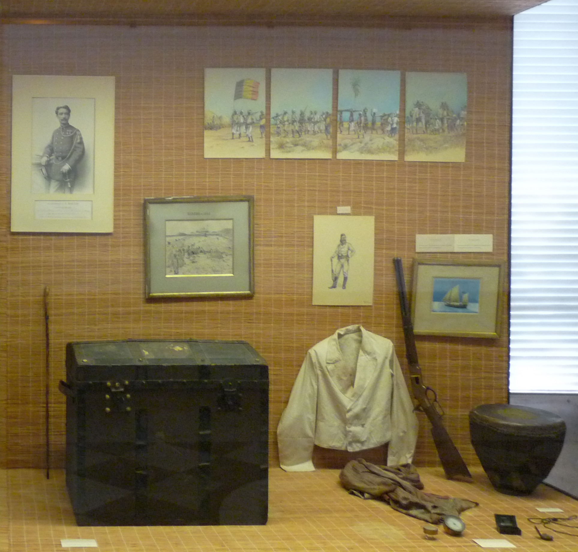 Vitrine dédiée au capitaine Storms (1846-1918) au Musée royal de l'Afrique centrale